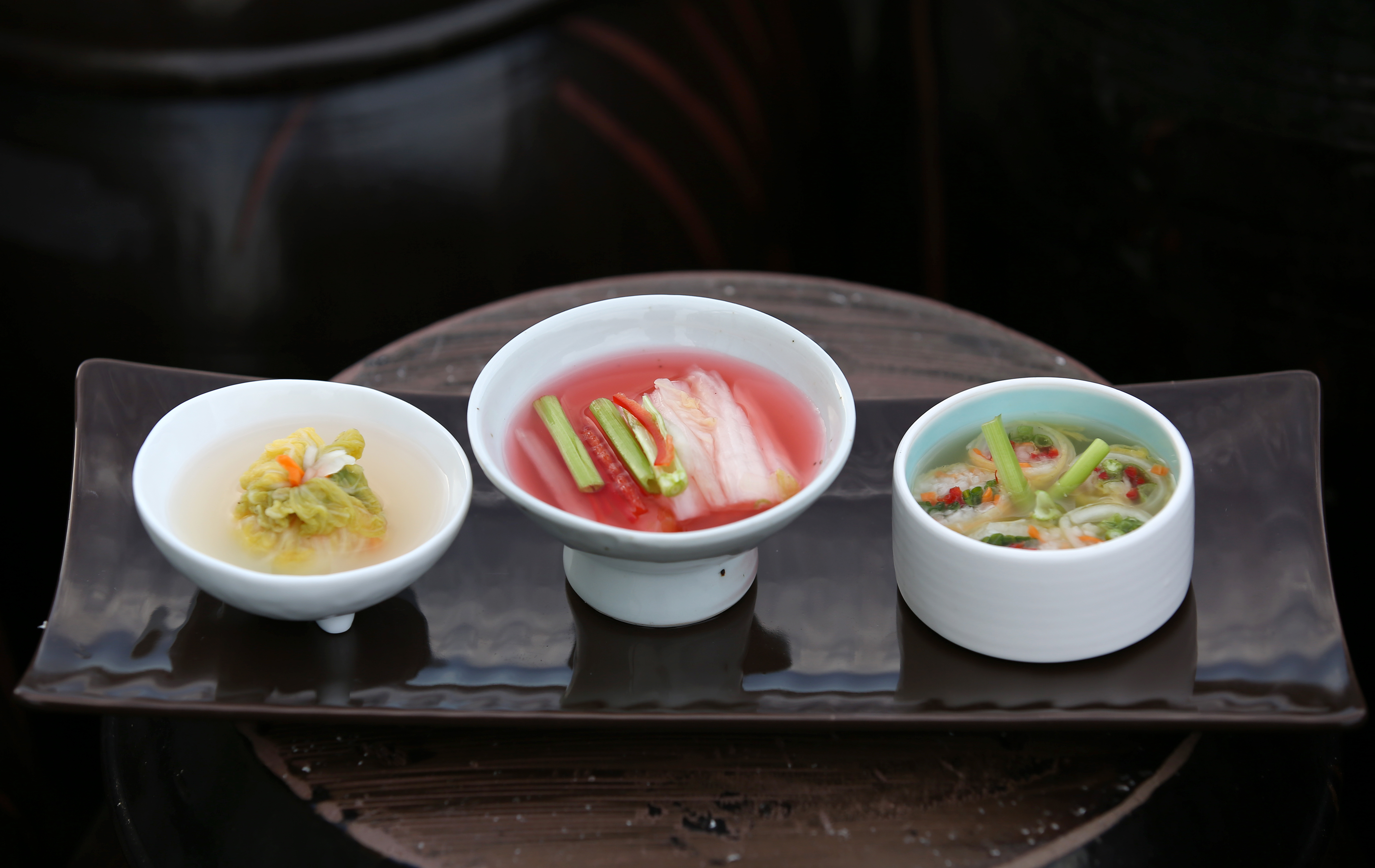 10 Korean Cuisines for 2018 PyeongChang Winter Olympic Games Cooking for Triple White Kimchi September 15, 2017 Institute of Traditional Korean Food, Jongno-gu, Seoul Ministry of Culture, Sports and Tourism Korean Culture and Information Service ( Official Photographer : Jeon Han This official Republic of Korea photograph is being made available only for publication by news organizations and/or for personal printing by the subject(s) of the photograph. The photograph may not be manipulated in any way. Also, it may not be used in any type of commercial, advertisement, product or promotion that in any way suggests approval or endorsement from the government of the Republic of Korea. 2018 평창 동계올림픽대회를 위한 세계인이 좋아하는 한식 10선 트리플 김치 만들기 2017-09-15 한국전통음식연구소 문화체육관광부 해외문화홍보원 코리아넷 전한